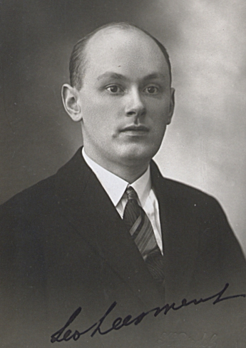 Leo Leesment, eesti õigusteadlane